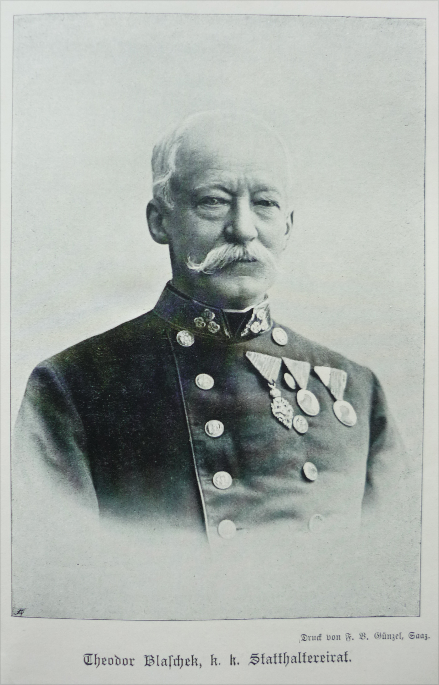 Theodor Blaschek (* 1831 in Dobritschan, † 1913 in Teplitz-Schönau), Statthaltereirat und Bezirkshauptmann des Bezirkes Saaz von 1890 bis 1894